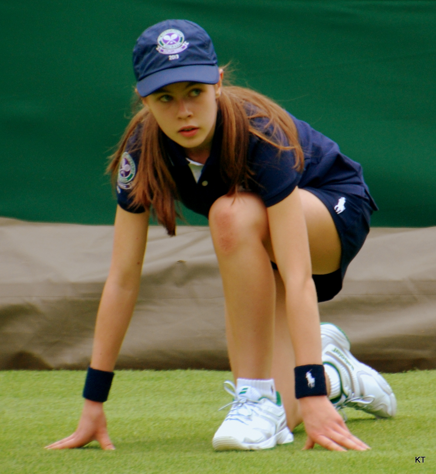 Wimbledon ballgirl